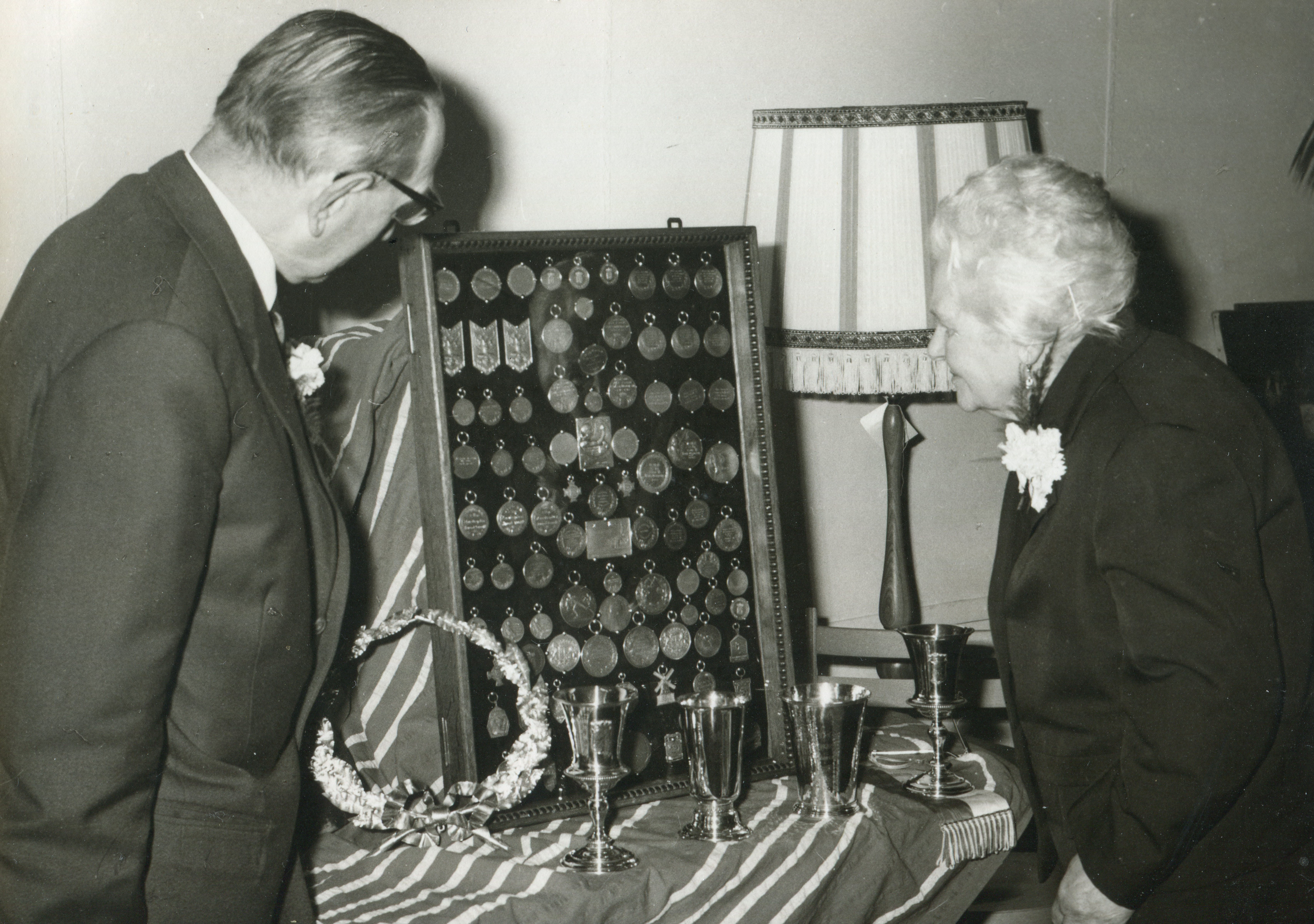 J.de Koning sr en echtgenote voor de prijzenkast.